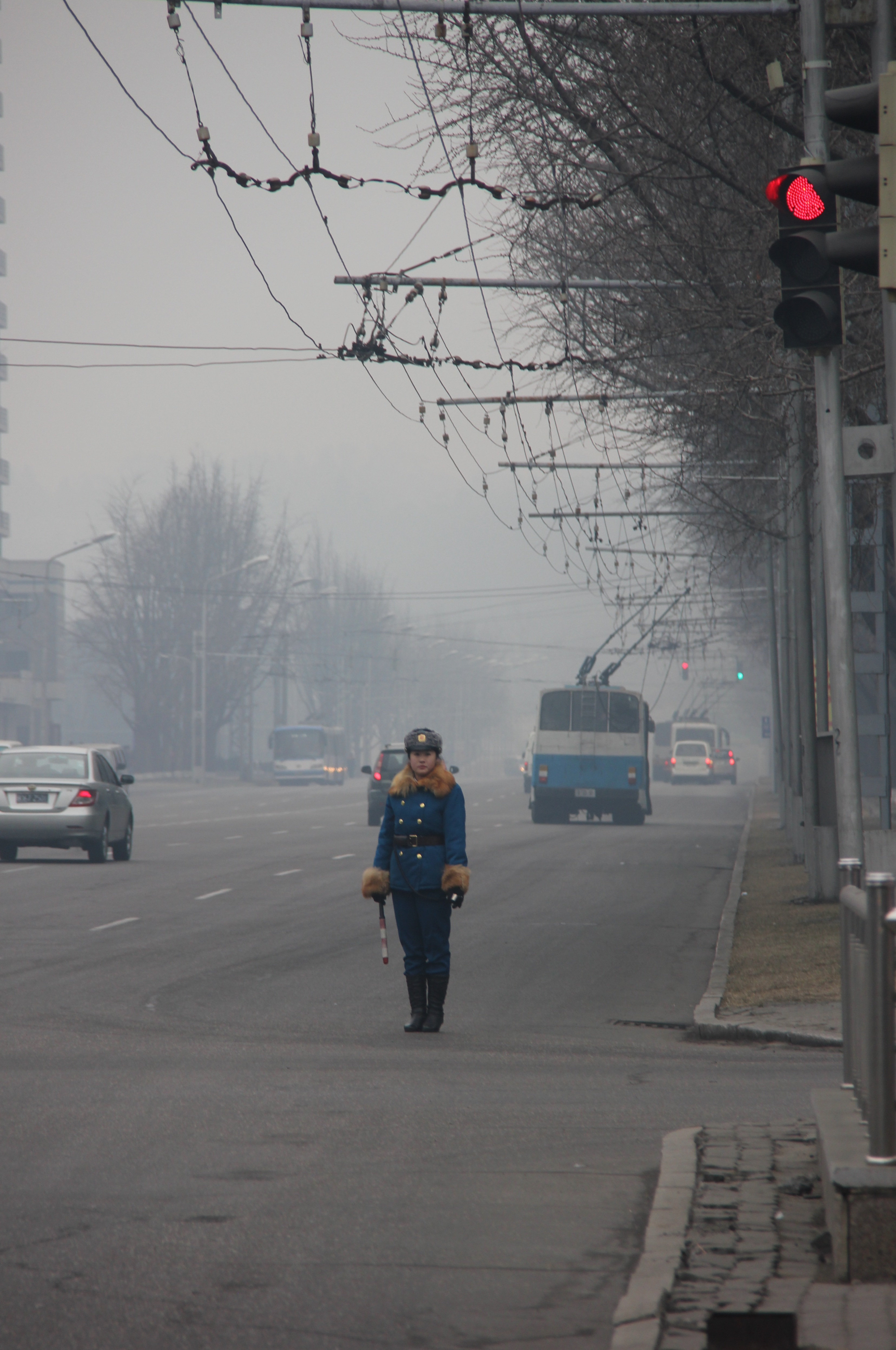 Pyongyang